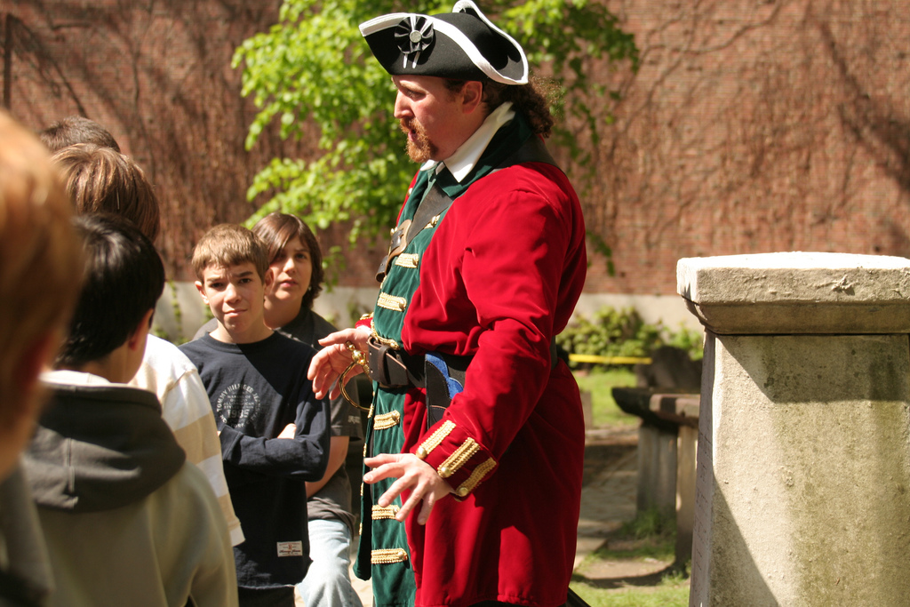 Tour guide at Paul Revere's Grave, Boston MA